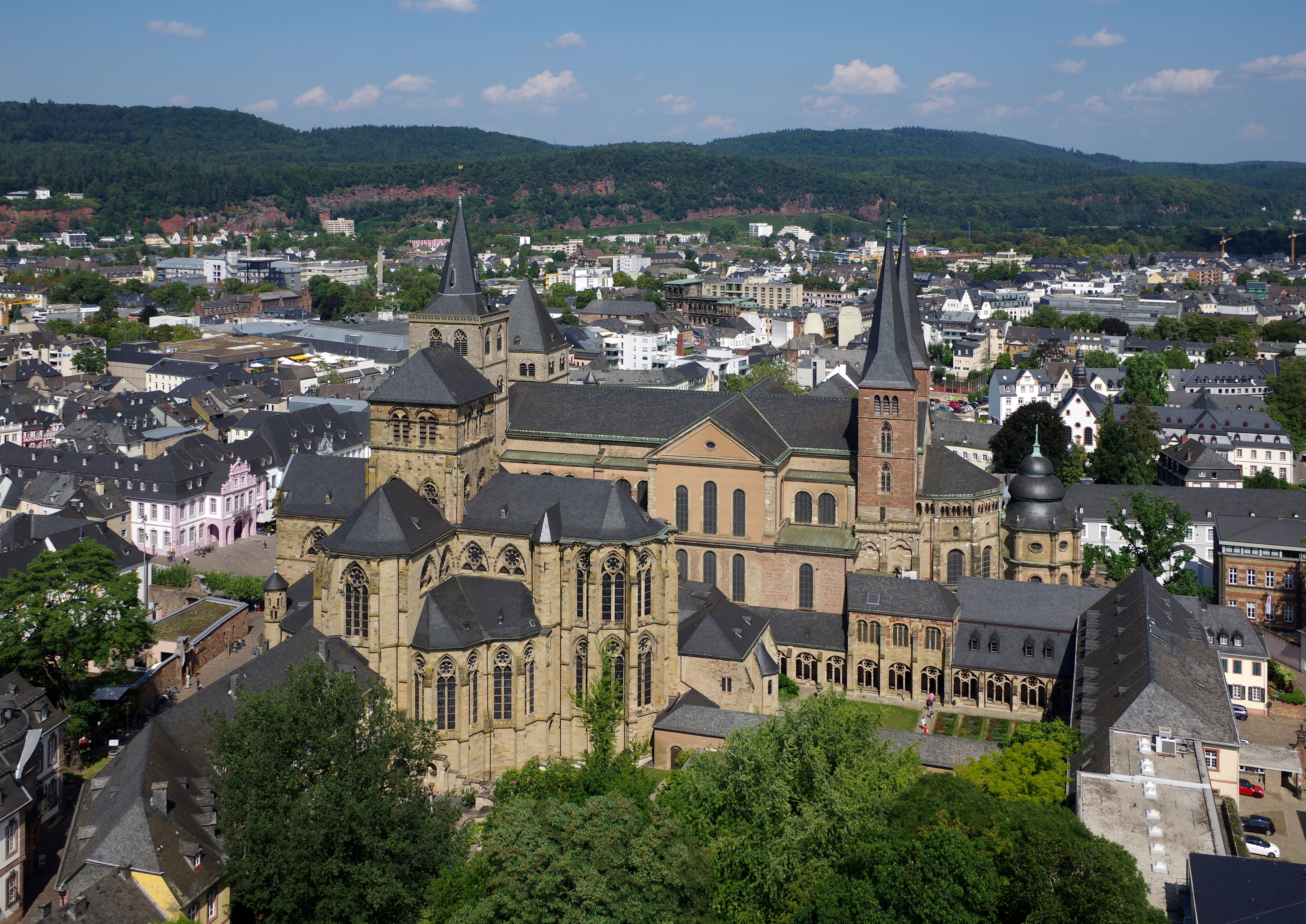 Trier, Dom und Liebfrauen, die Bauwerke gehören zum UNSECO Welterbe Trier, aufgenommen aus dem City Skyliner aus ca. 70 m Höhe